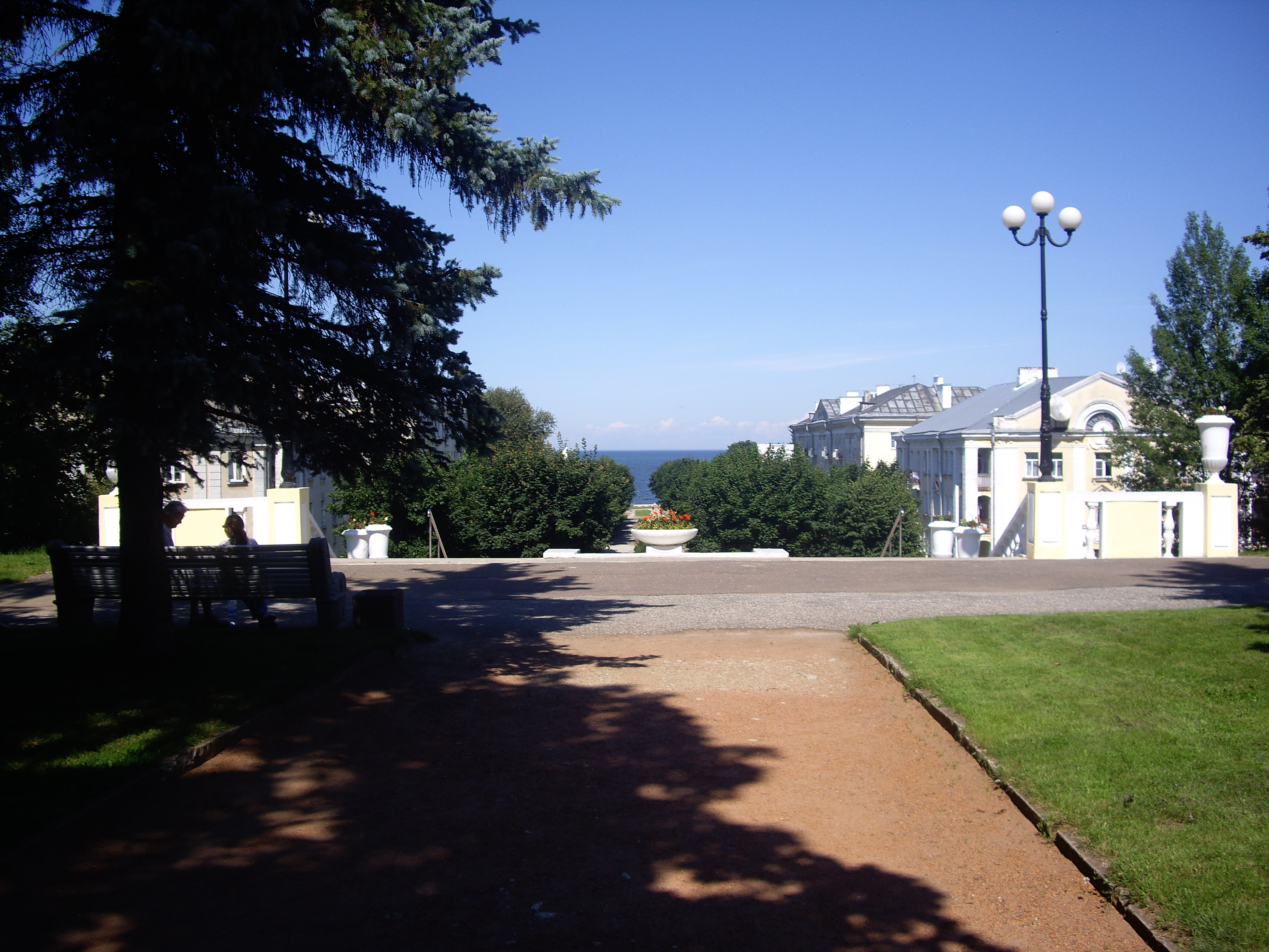 Mere puiestee Sillamäel